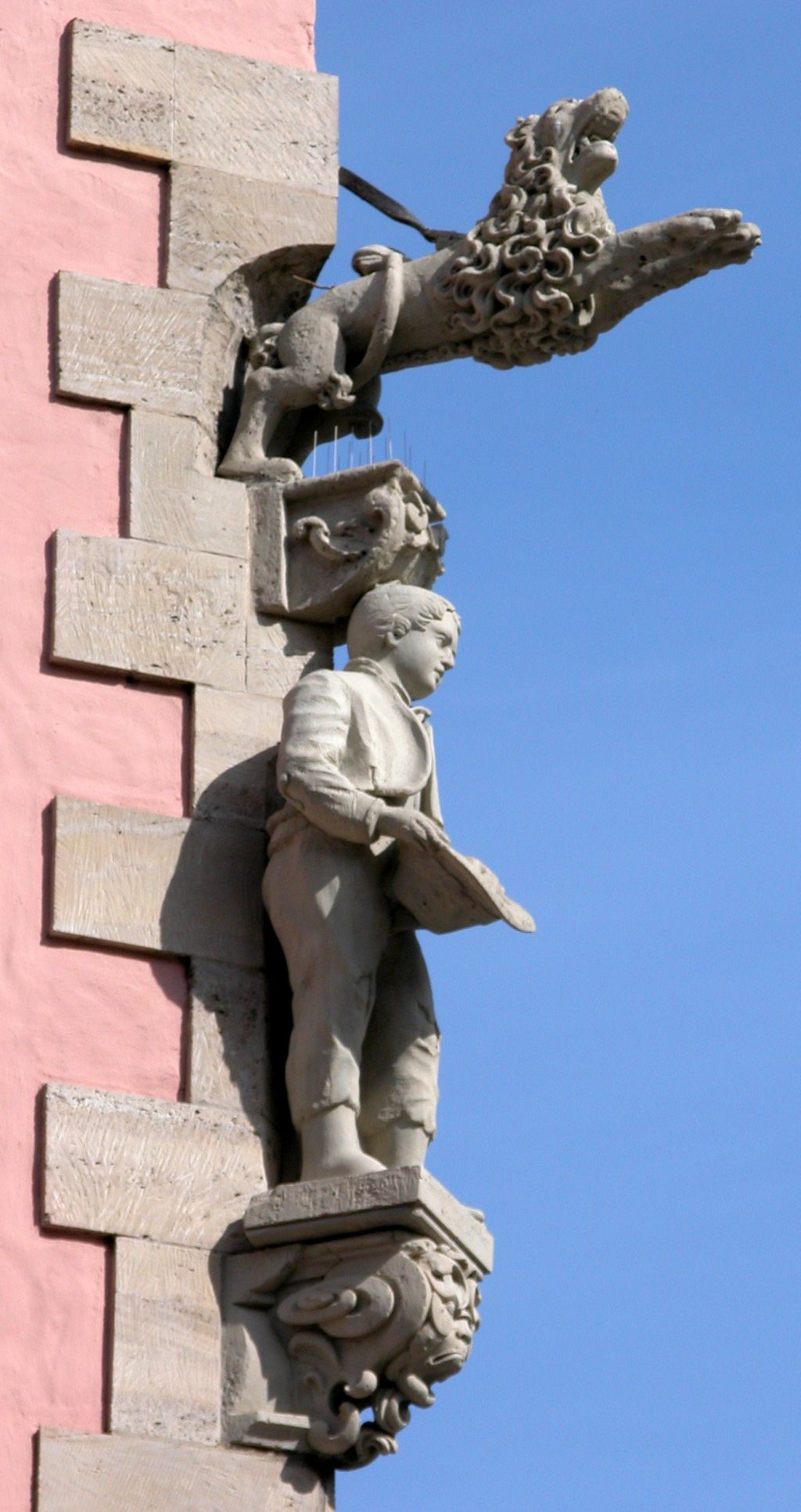 Braunschweig: Stechinelli-Haus, Junge mit Löwe